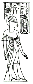 Mutnedjmet, sister of Nefertiti.